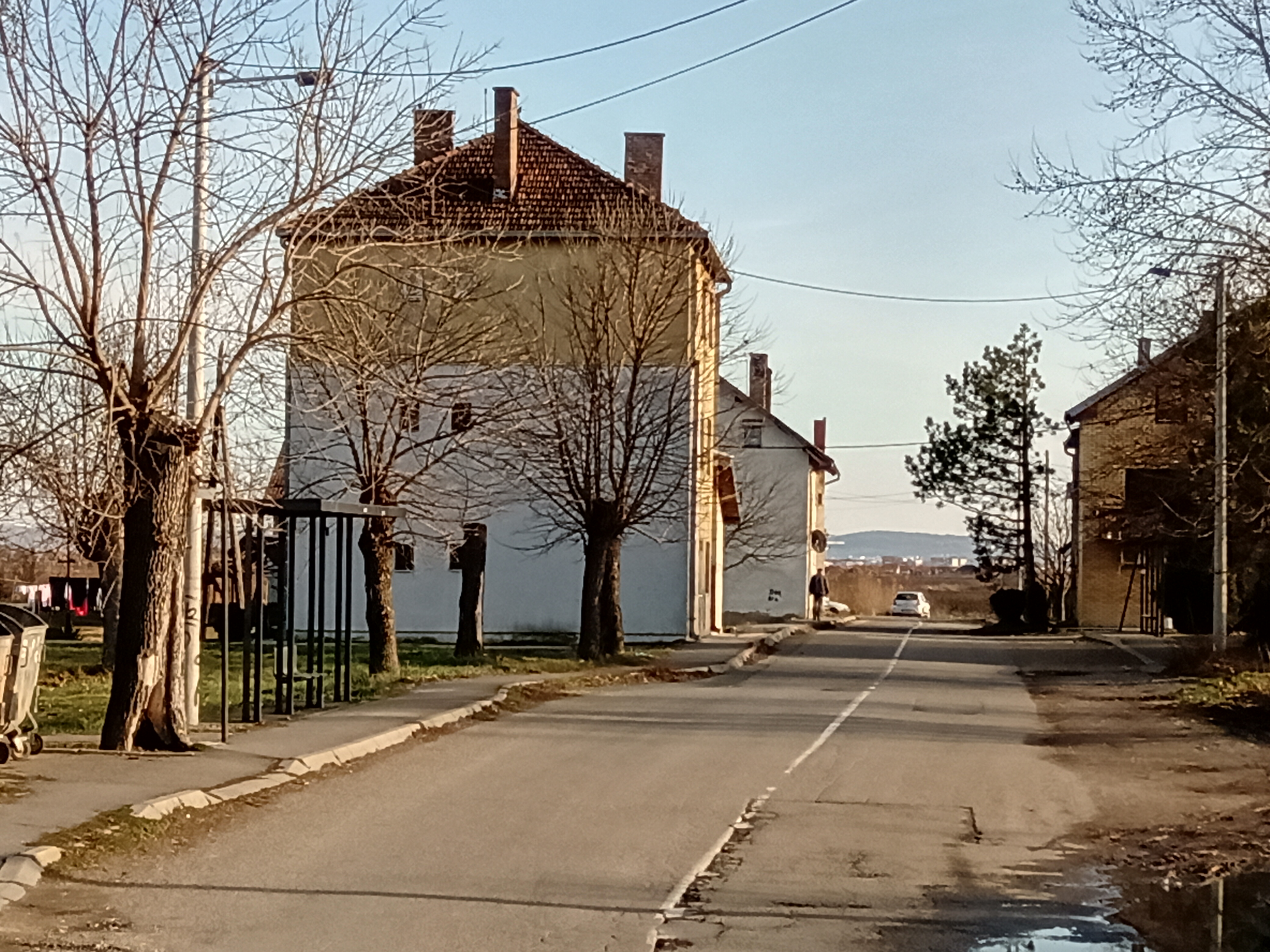 Насеље Ковилово